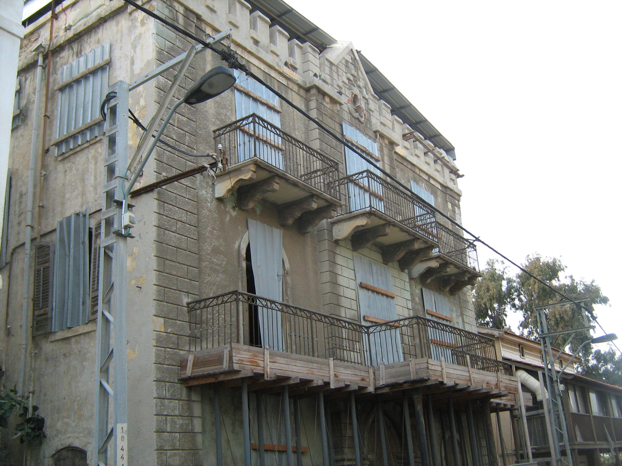 המושבה האמריקאית ביפו